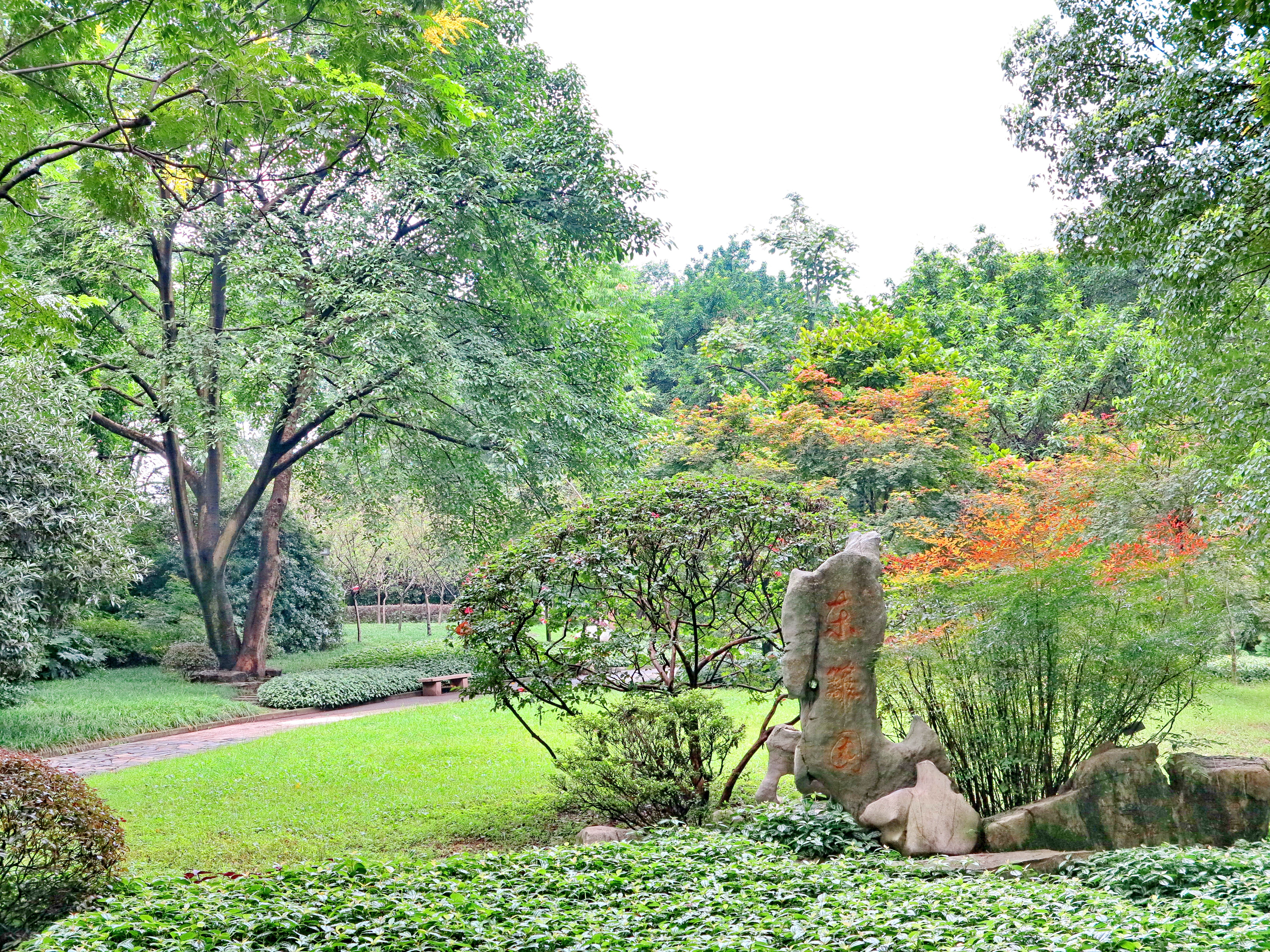 鹅岭公园 已见秋色